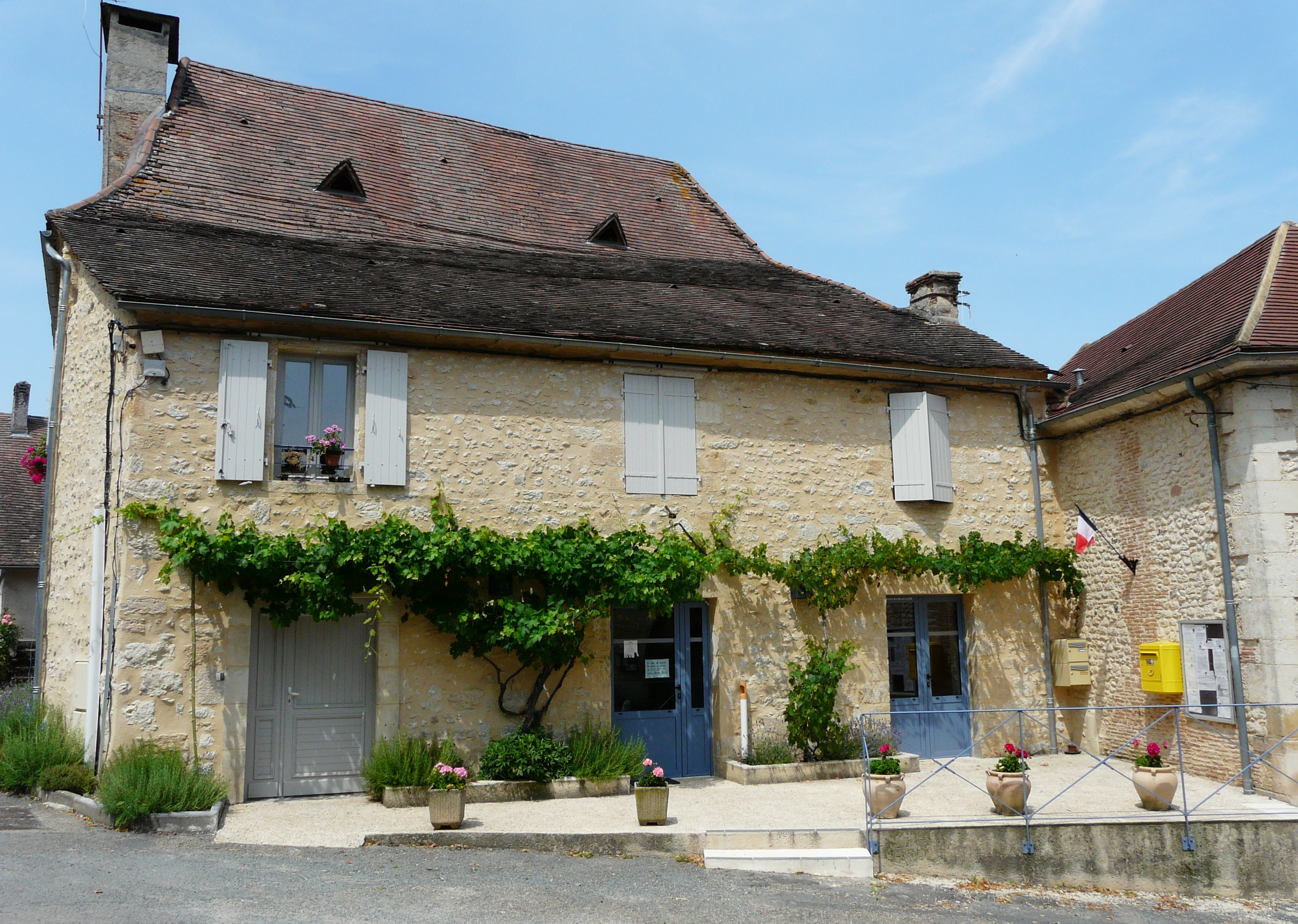 La mairie de Bars, Dordogne, France.